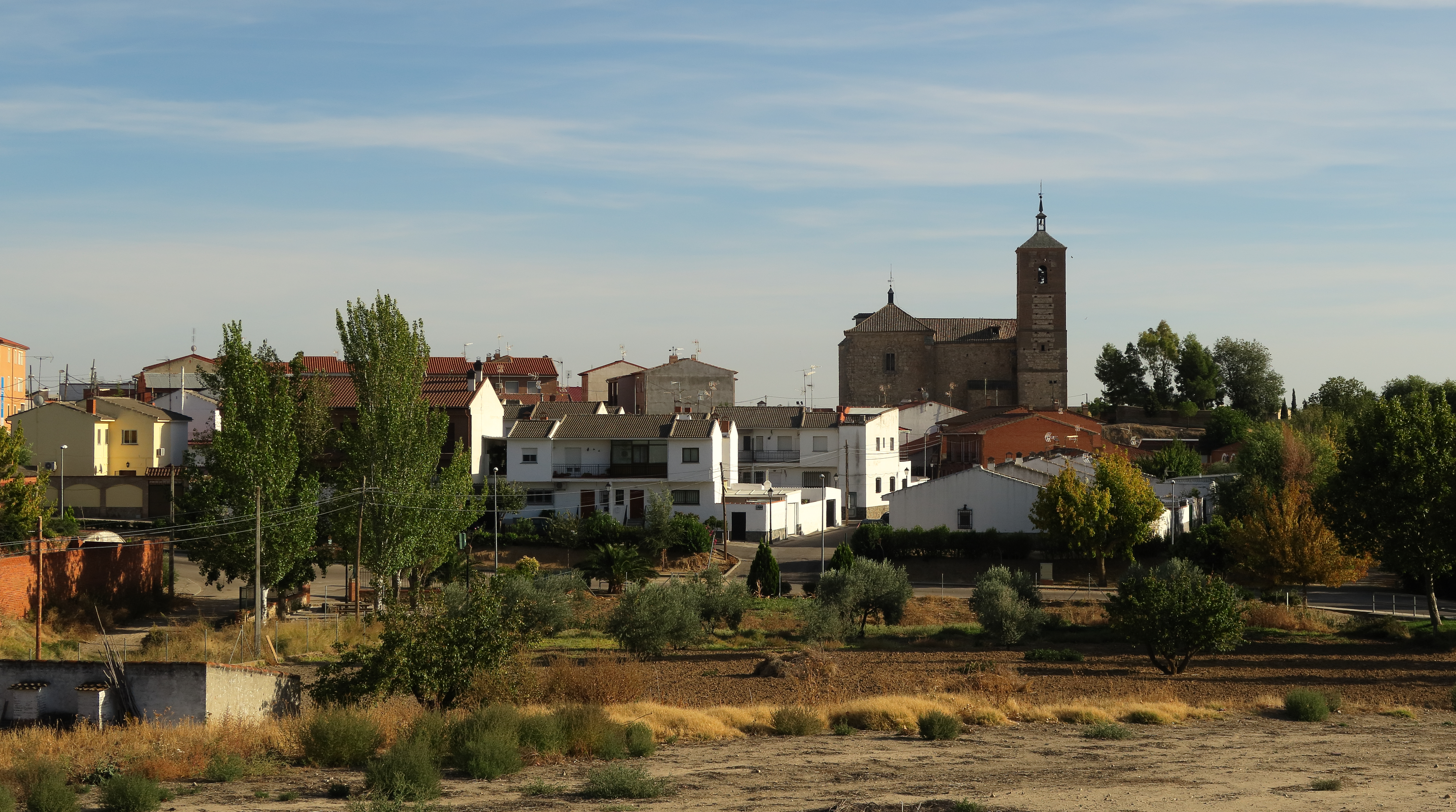 Huecas, vista de la población desde la Urb. el Olivar